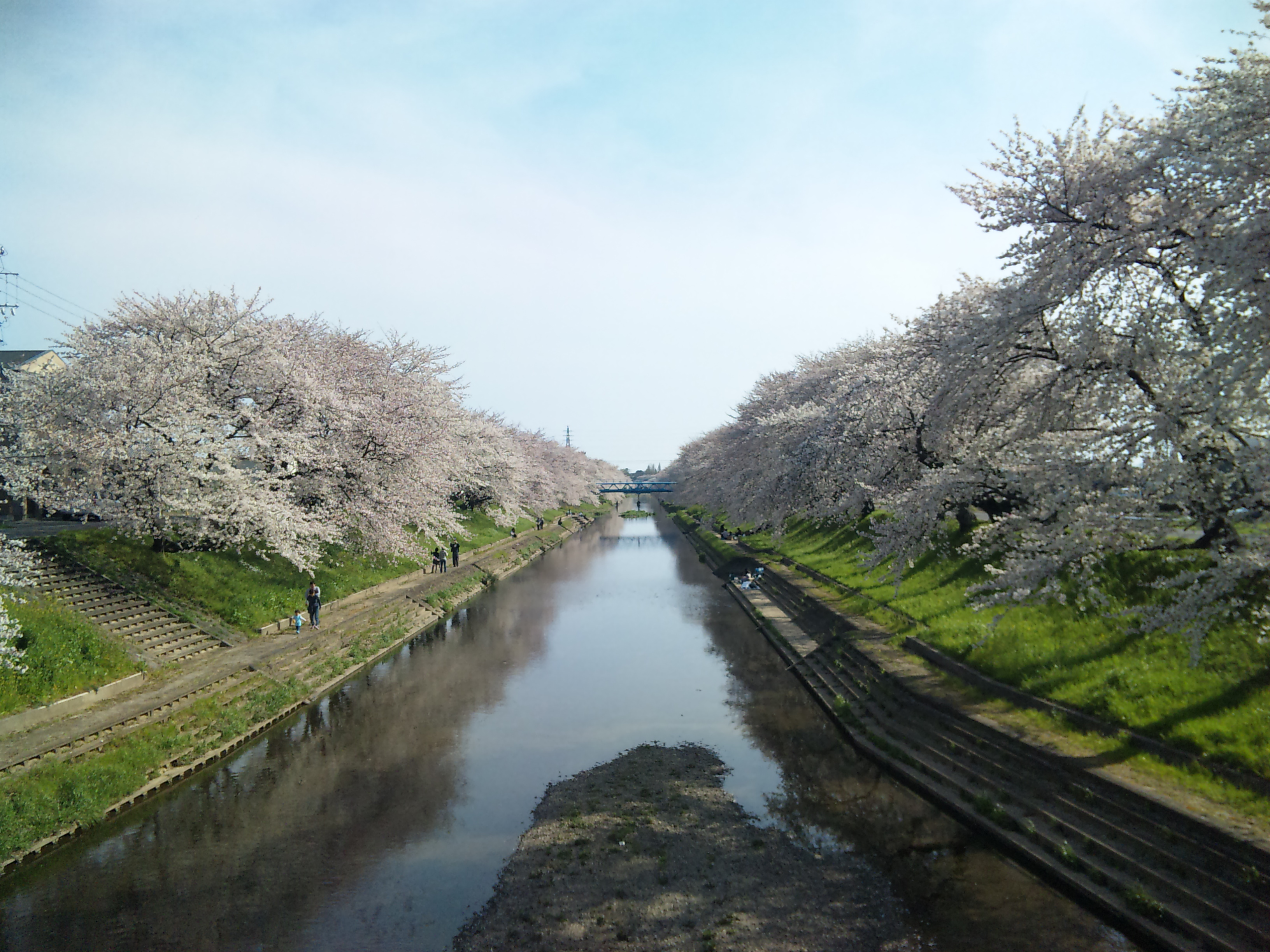 新境川に咲く百十朗桜